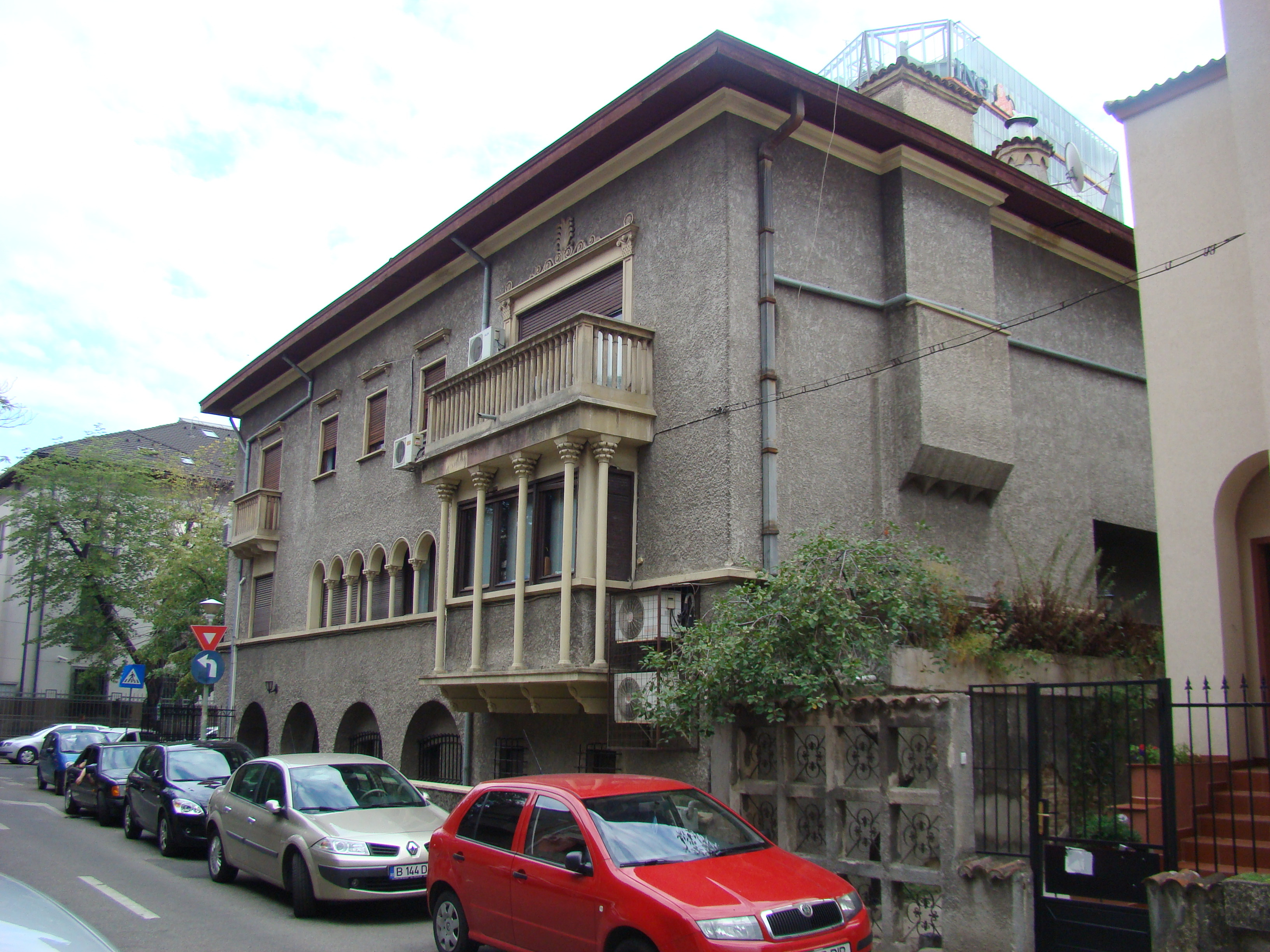 Clădire monument istoric, str. Tokio, nr.14